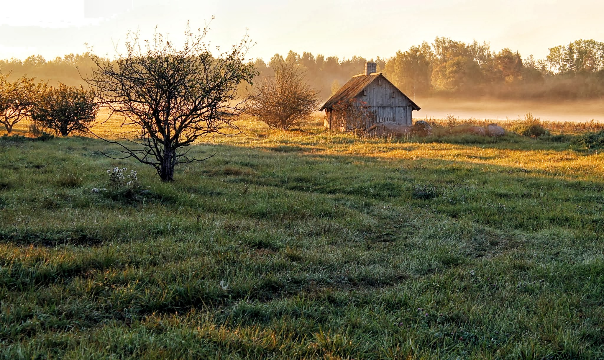 Elu maal. Loodus on kaunis, aga inimesi... väheks on jäänud. Vilivalla asub Pühalepa vallas Hiiumaal.